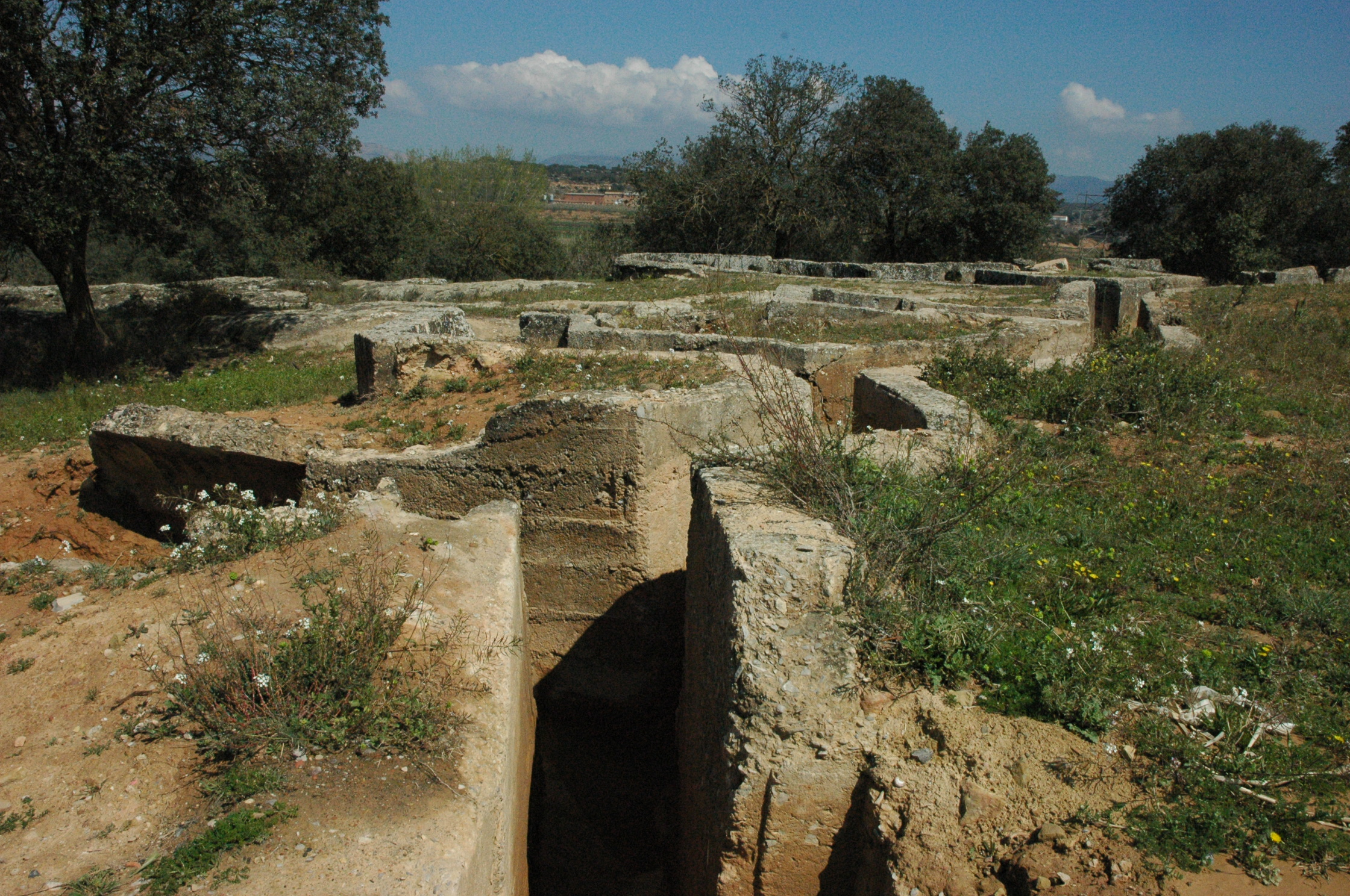 Trinxera Franquista de la Guerra Civil a el nucli de població de El Tossal de les Forques de La Sentiu de Sió (La Noguera).